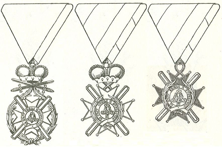 Drie kruisen van de Servische Takowo -Orde